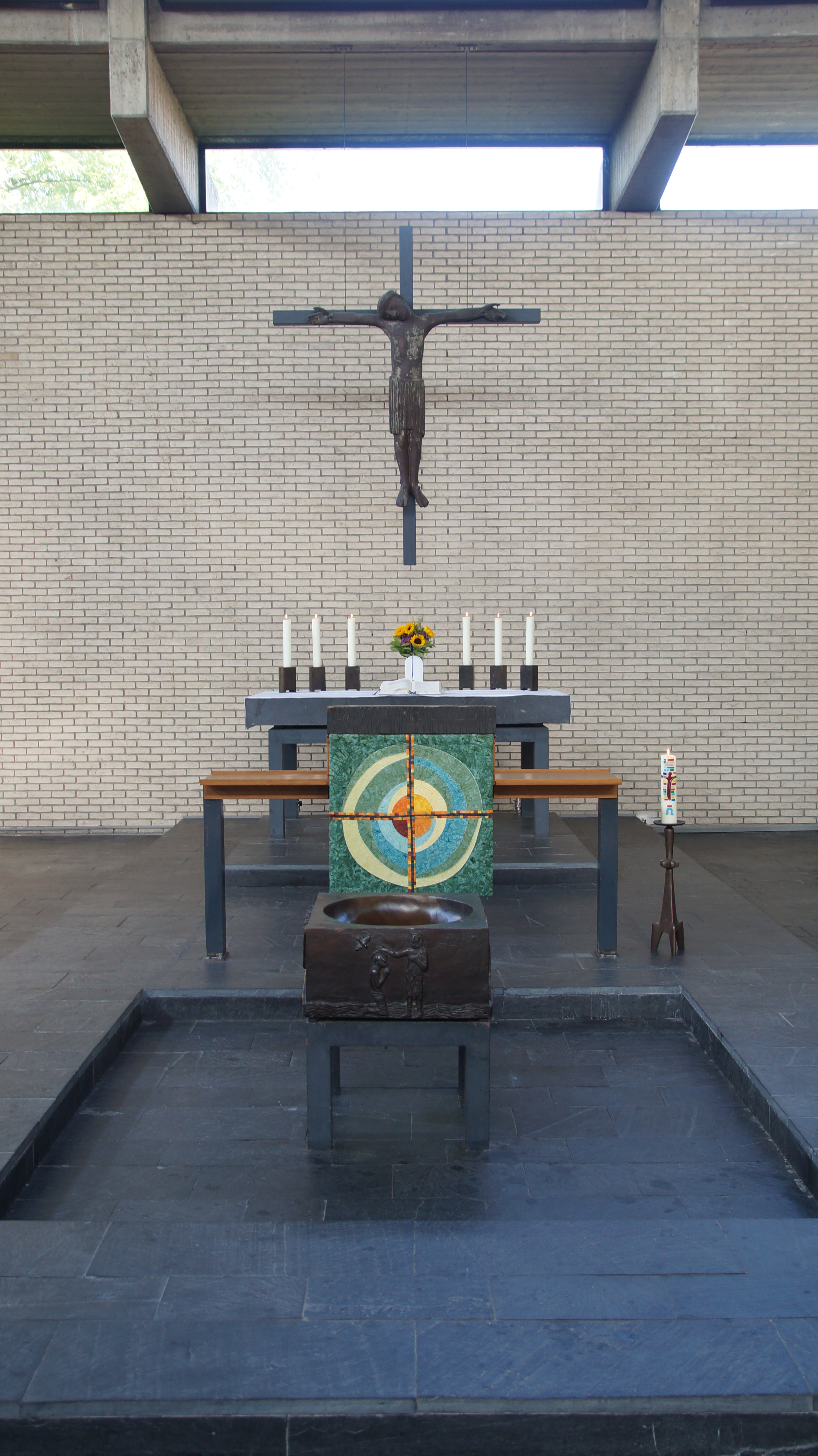 Altarinsel mit Taufbecken, Ambo und Kreuz